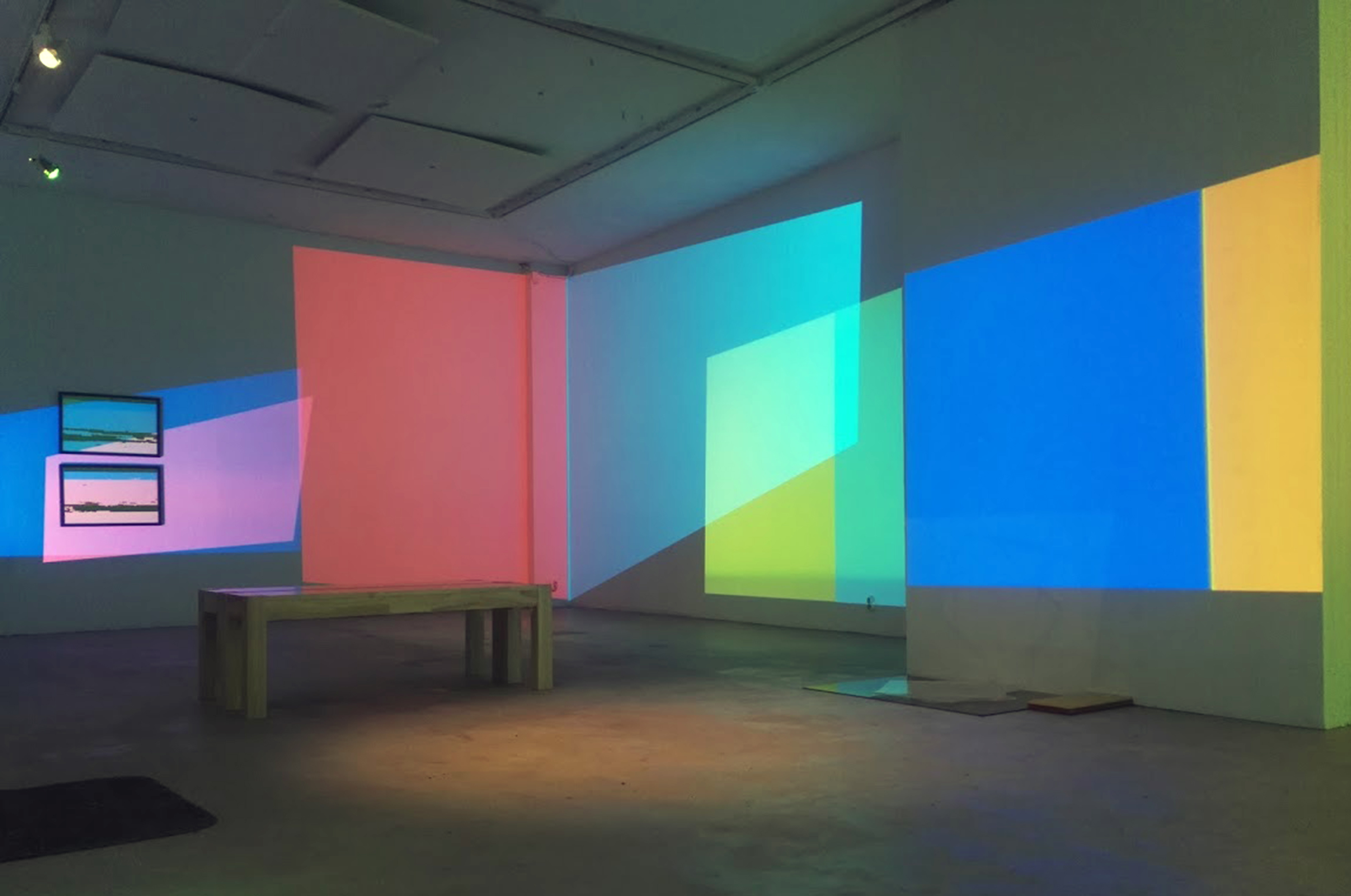 Juan Kasari